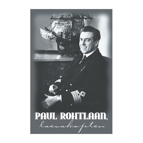 Laevakapten Paul Rohtlaan